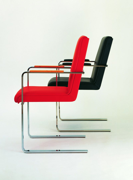 Gert M Weber - S-10, 1975, stainless steel, wood,leather, 90 x 65 x 54/58/62 cm